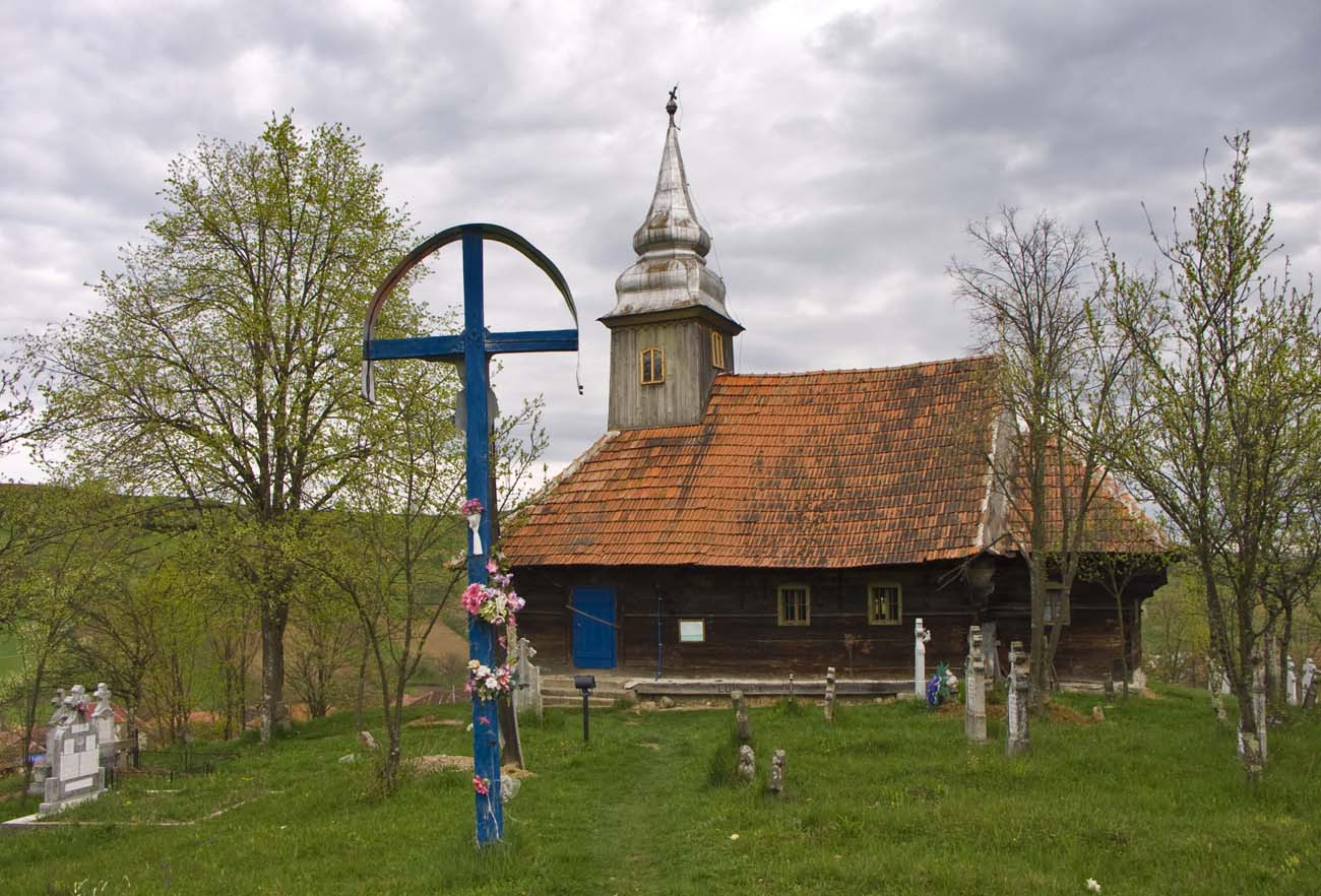 Biserica de lemn din Hinchiriş, Bihor, faţada de sud.